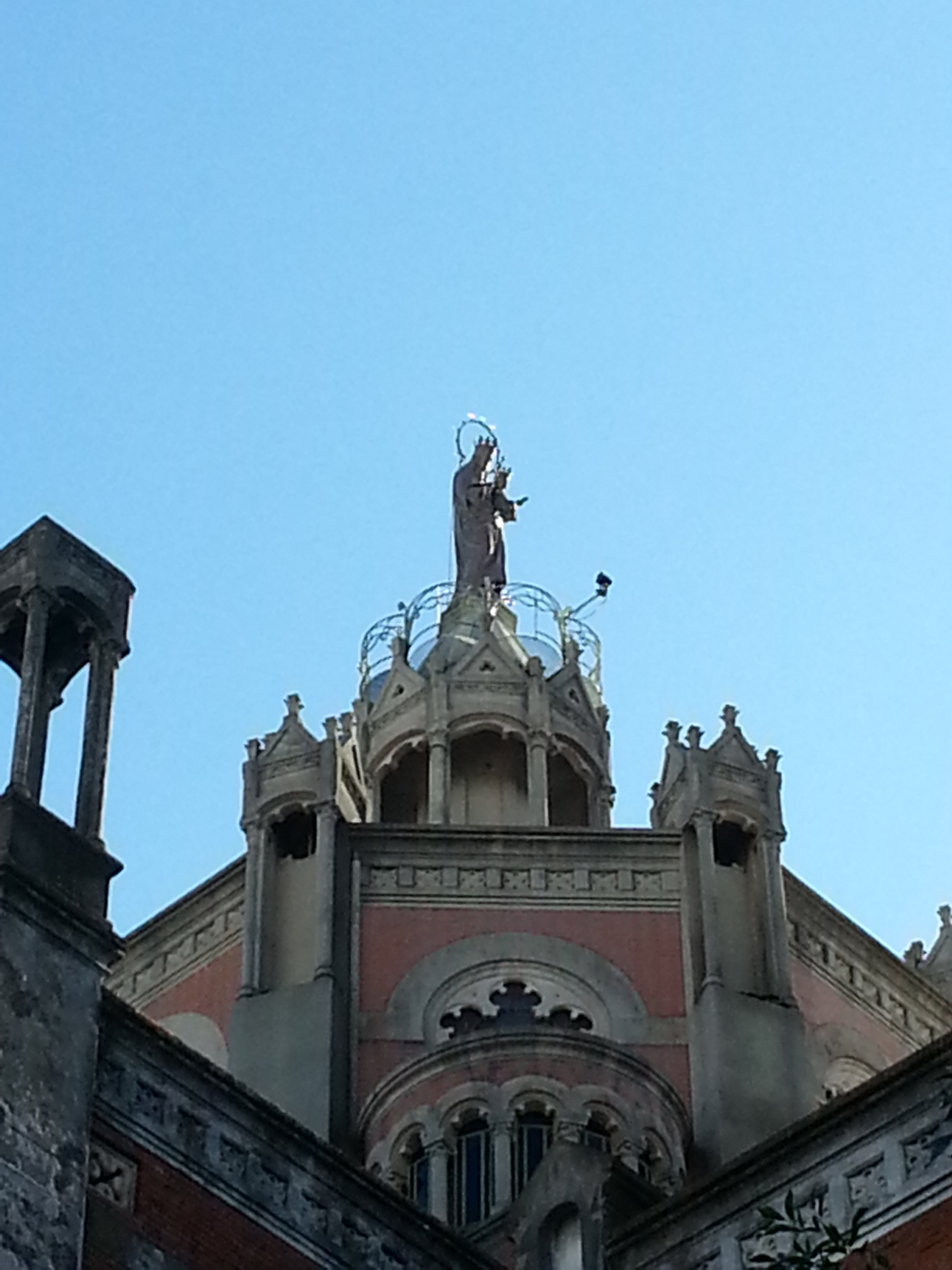 Cúpula de la Basílica María Auxiliadora y San Carlos, coronada por una linterna que sustenta una imagen de María Auxiliadora de cinco metros de altura.